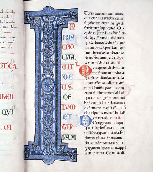 Reproduction d'une page de la Grande Bible de Clairvaux, manuscrit enluminé du XIIe siècle